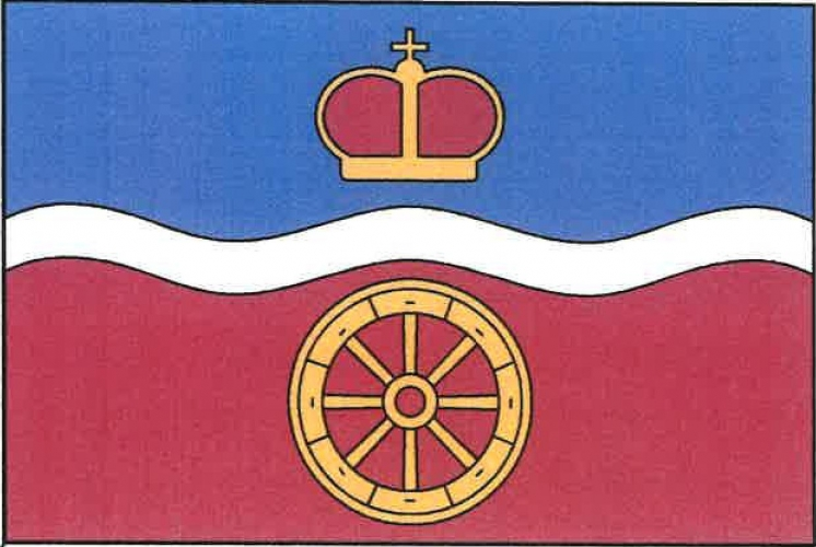 vlajka, Mikulovice, okres Pardubice